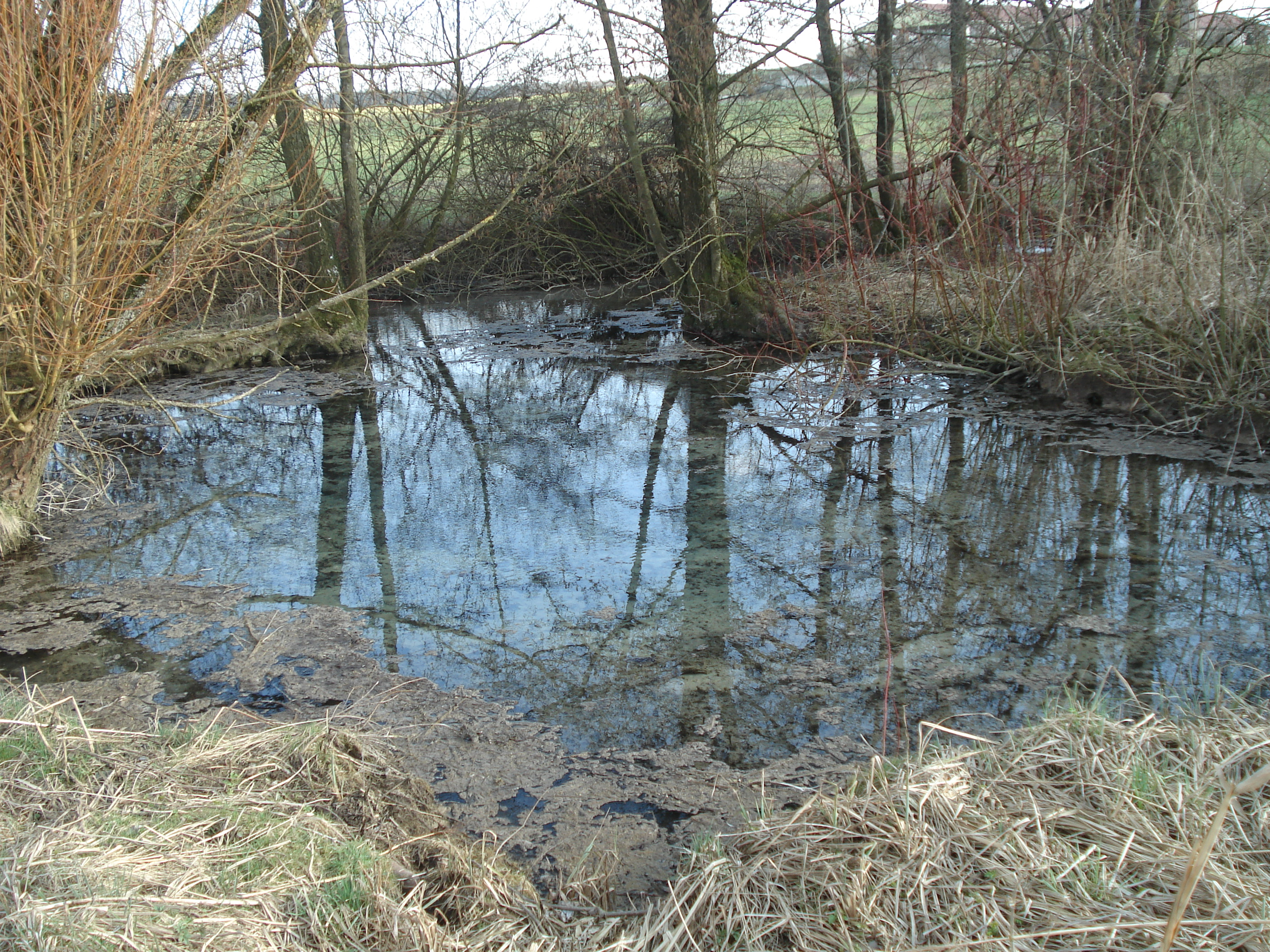 Karstquelle Grundlos